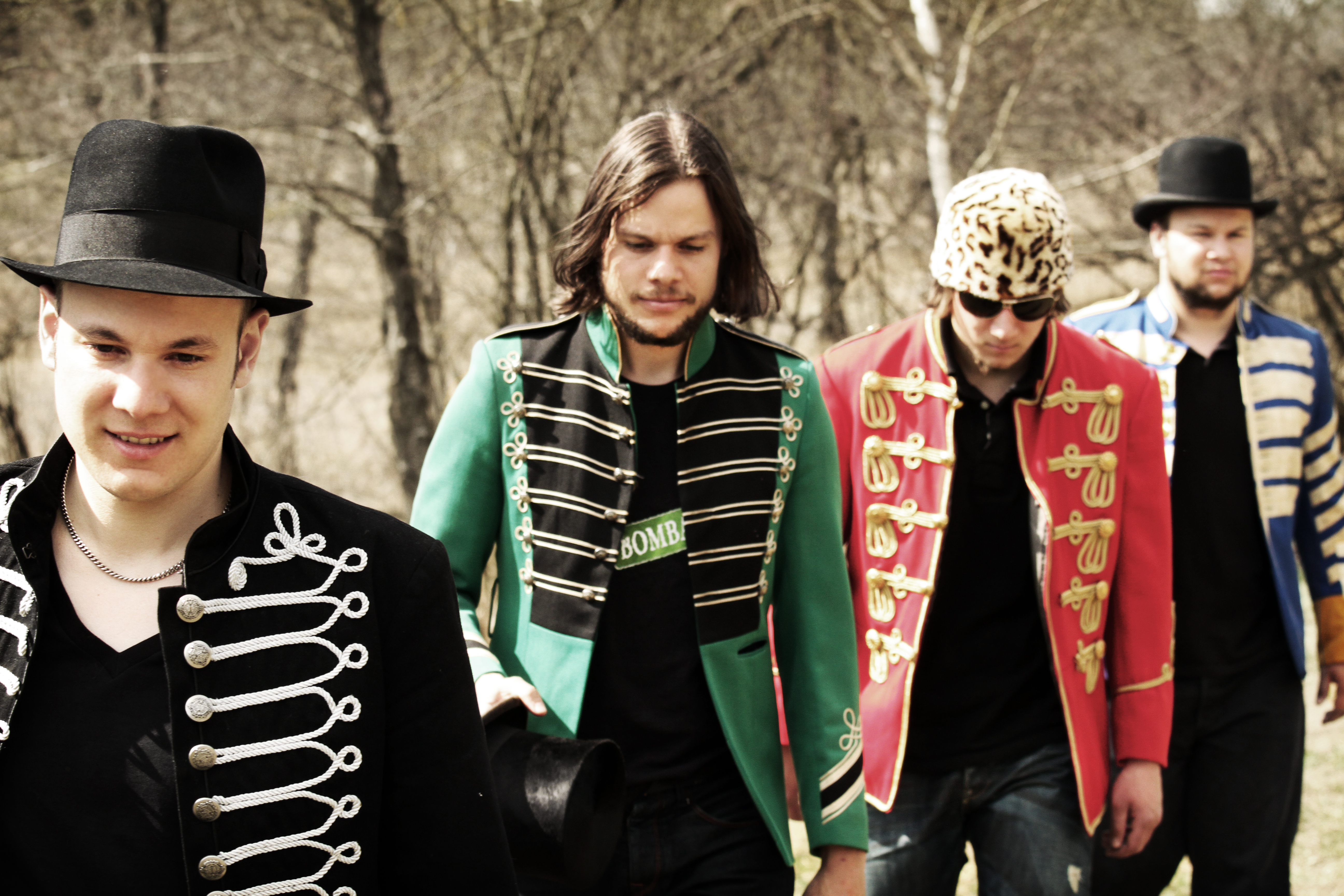 Schweizer Band 77 Bombay Street